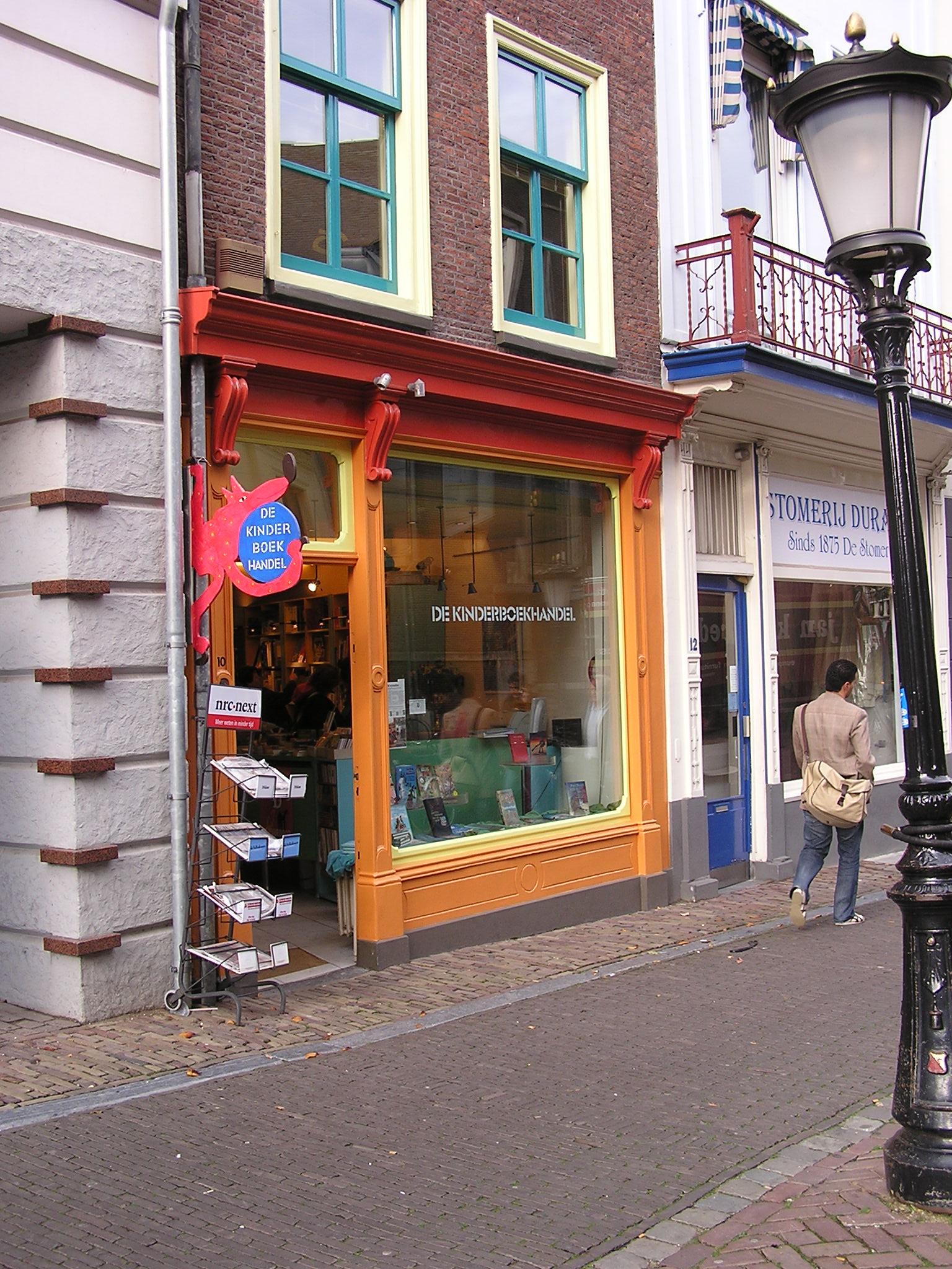 Children's book shop in Utrecht, Holland (Ganzenmarkt 10, gemeentelijk monument)